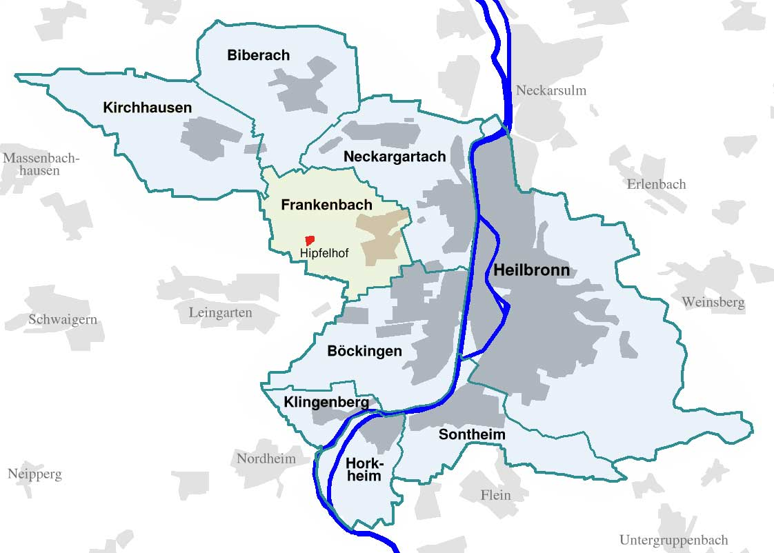 Lage des Hipfelhofs (rot) innerhalb des Heilbronner Stadtteils Frankenbach (gelblich)